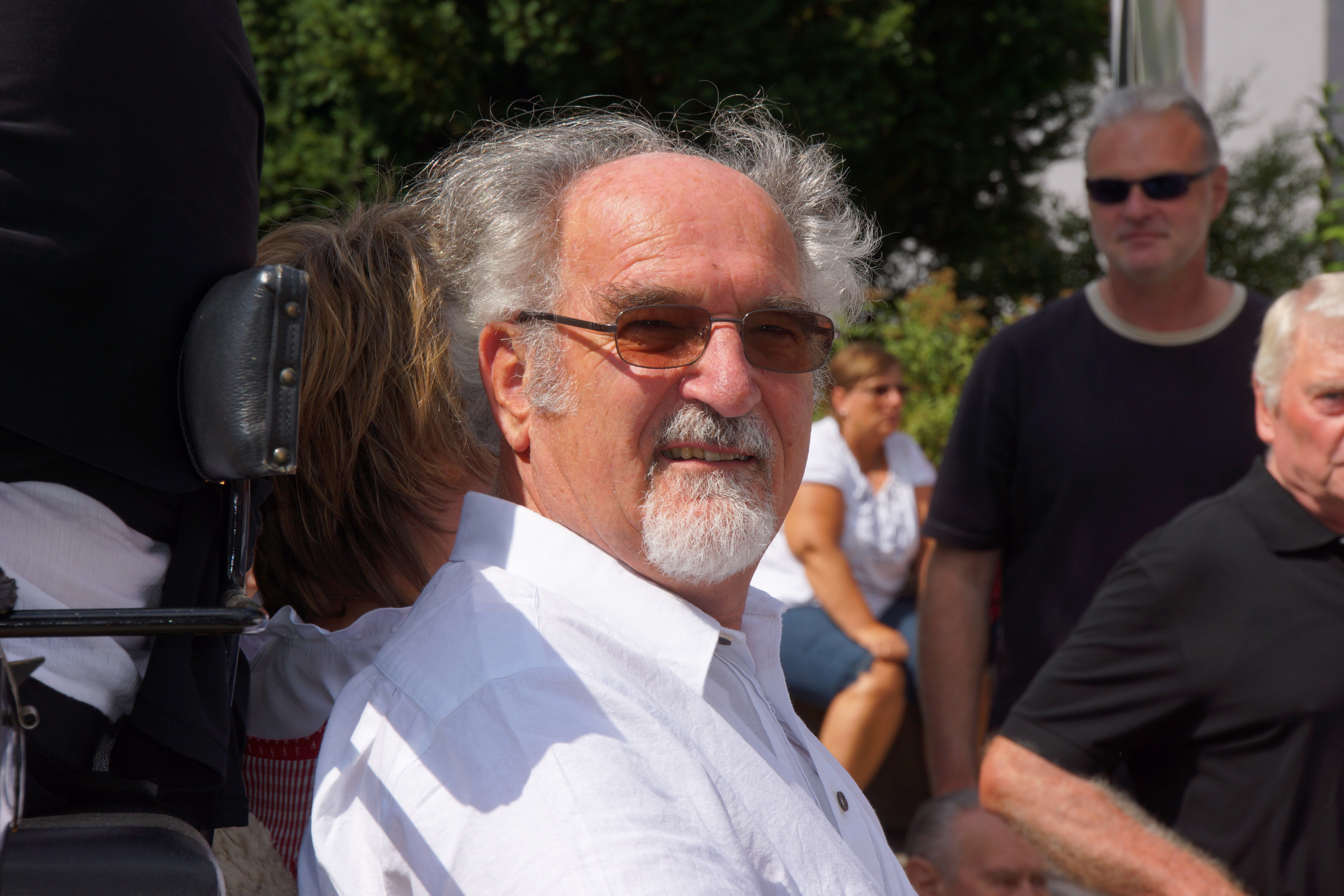 Der Volksfestumzug im Jahr 2013 in der Oberpfälzer Kreisstadt Neumarkt